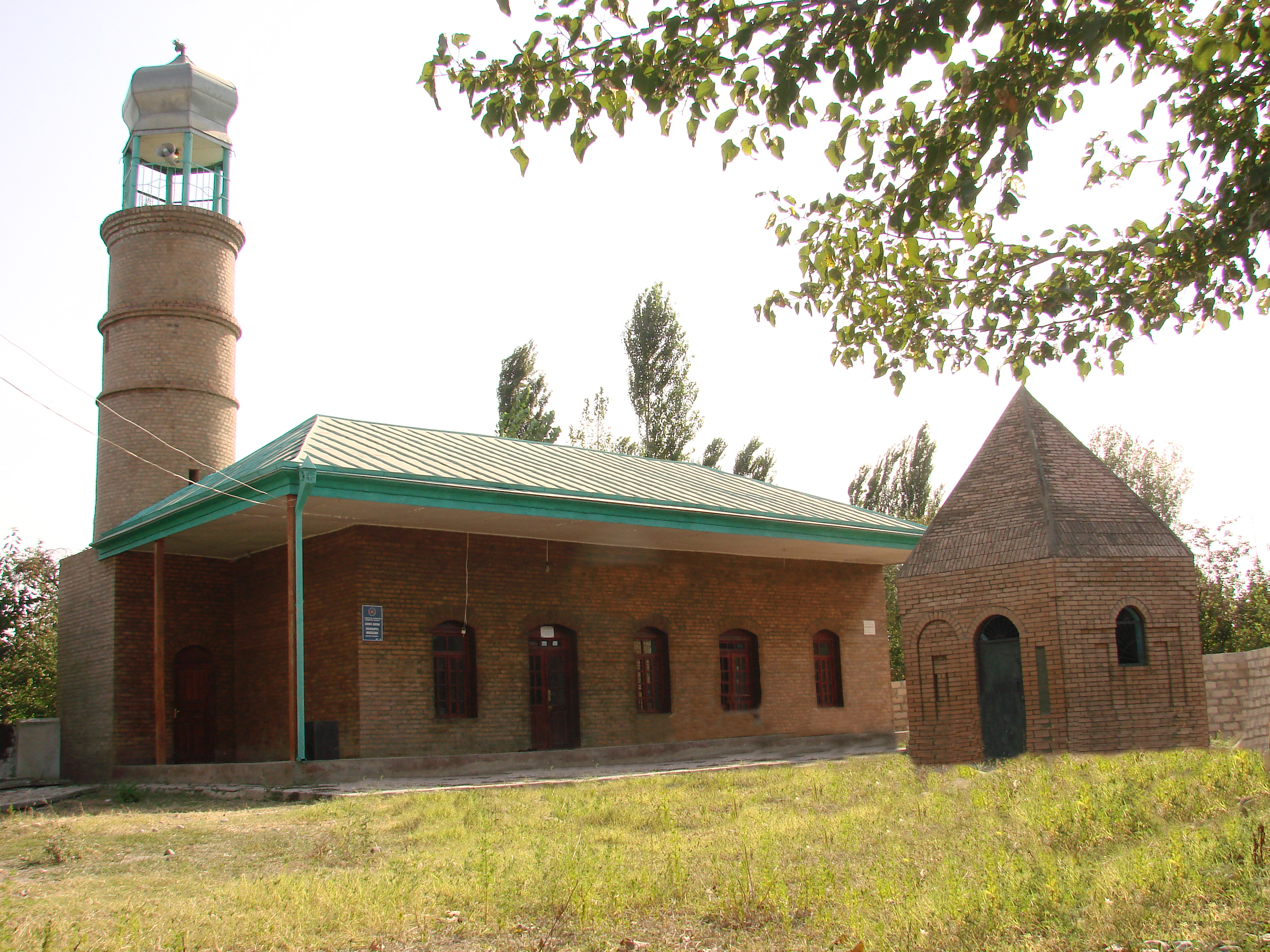 Bərdə rayonunun Uğurbəyli kəndində məscid